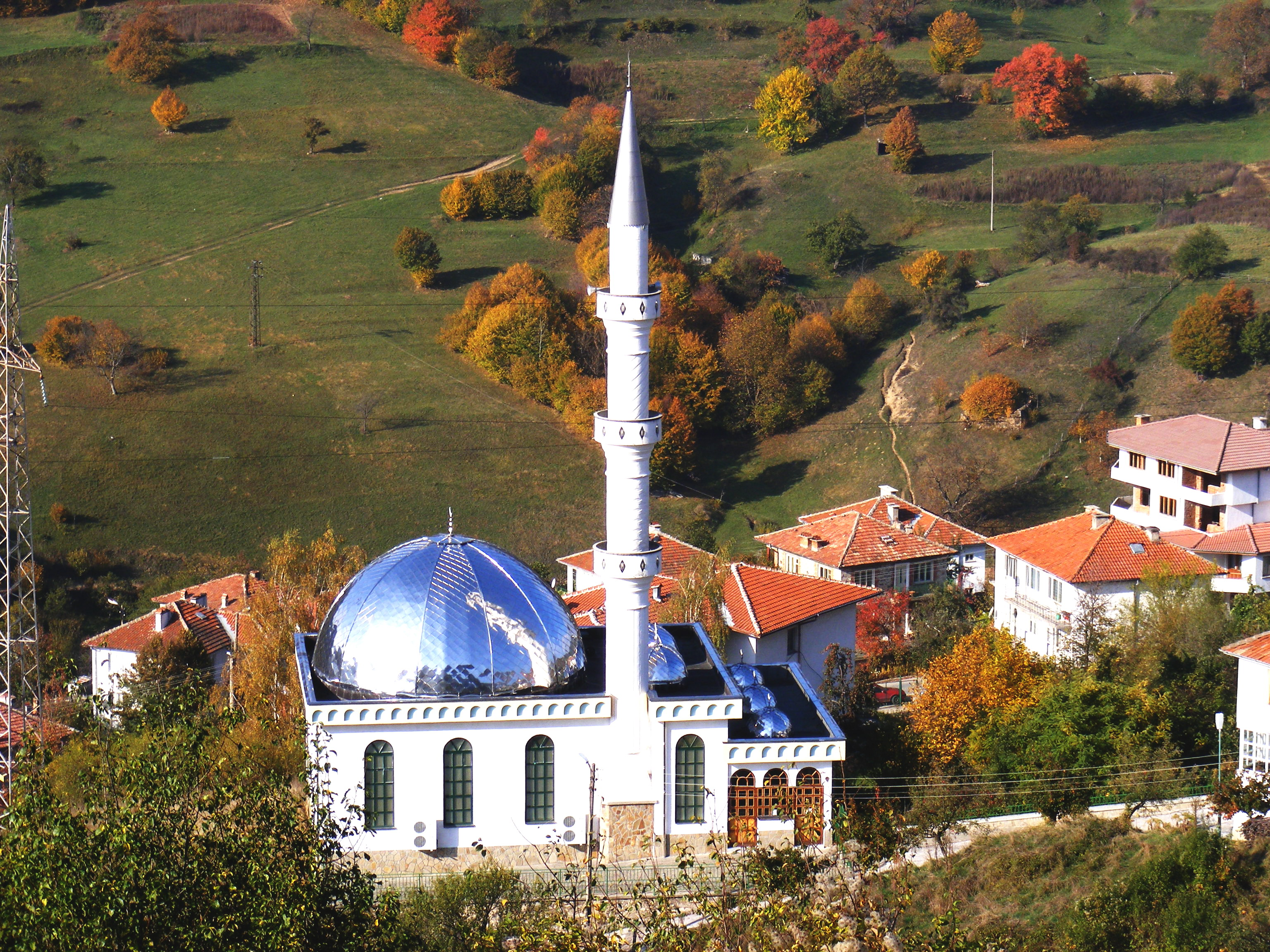 Джамията в Търън